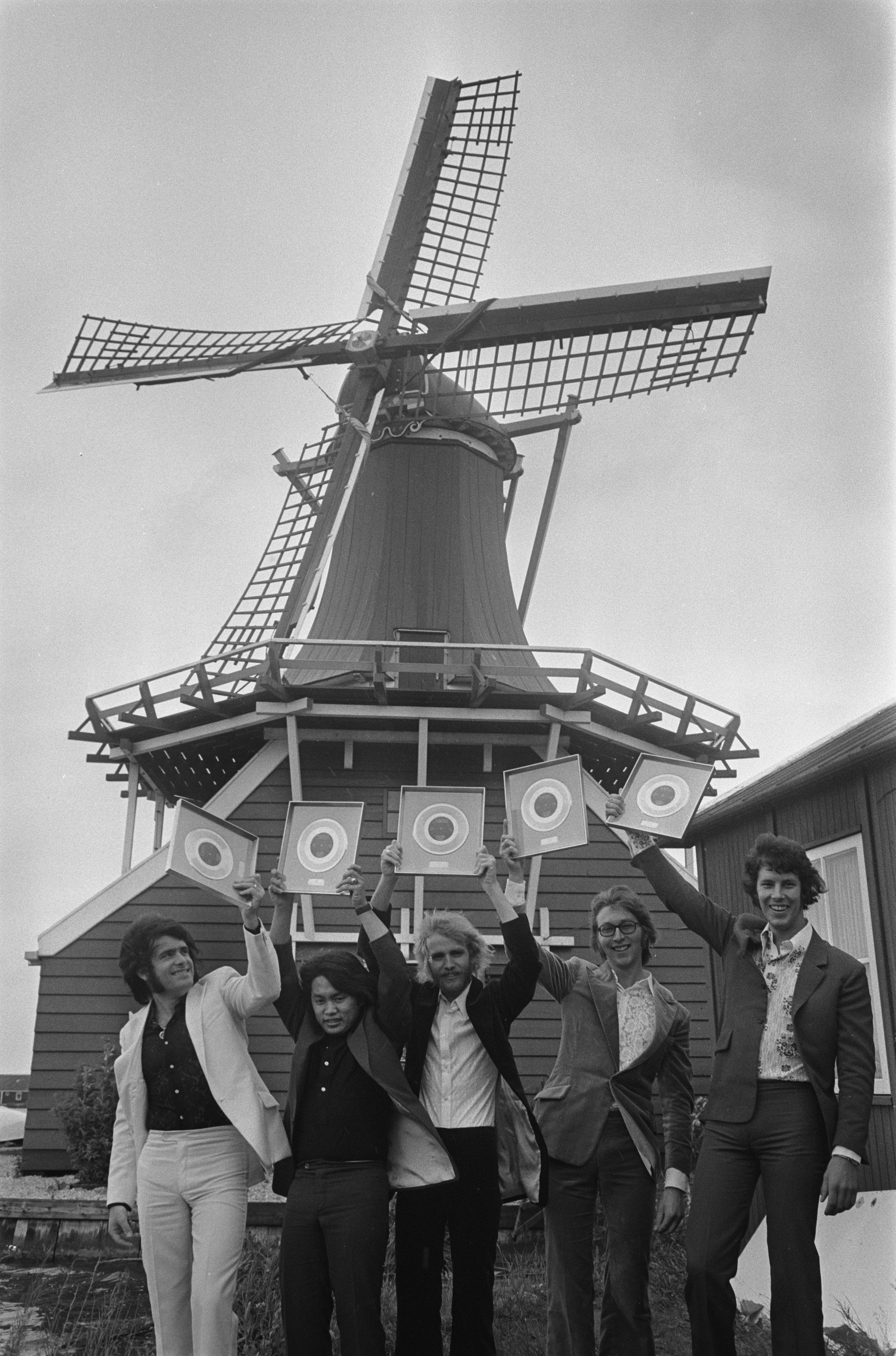 De Zaanse popgroep The George Baker Selection krijgt gouden plaat uitgereikt voor Little Green Bag (1 miljoen exemplaren) op de Zaanse Schans. Tegen het decor van de mosterdmolen De Huisman toont de groep zijn net verworven trofee. Van links naar rechts: George Baker, George Thé, Jan Visser, Jan Hop, Jacques Greuter.